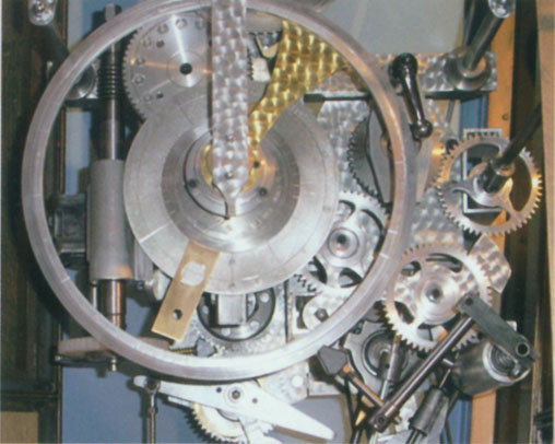 Mécanisme d'un planétaire